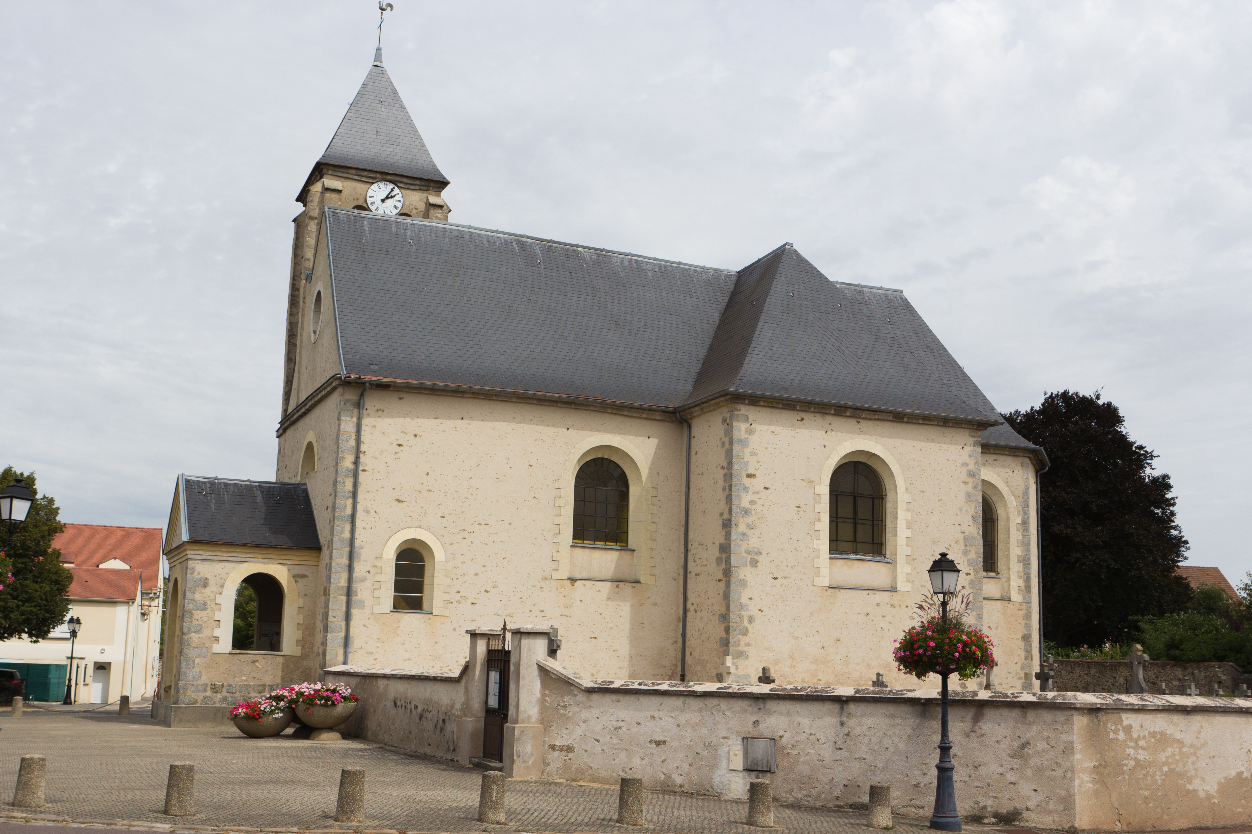 L'église du Plessis-Pâté, commune du Plessis-Pâté, département de l'Essonne. France.